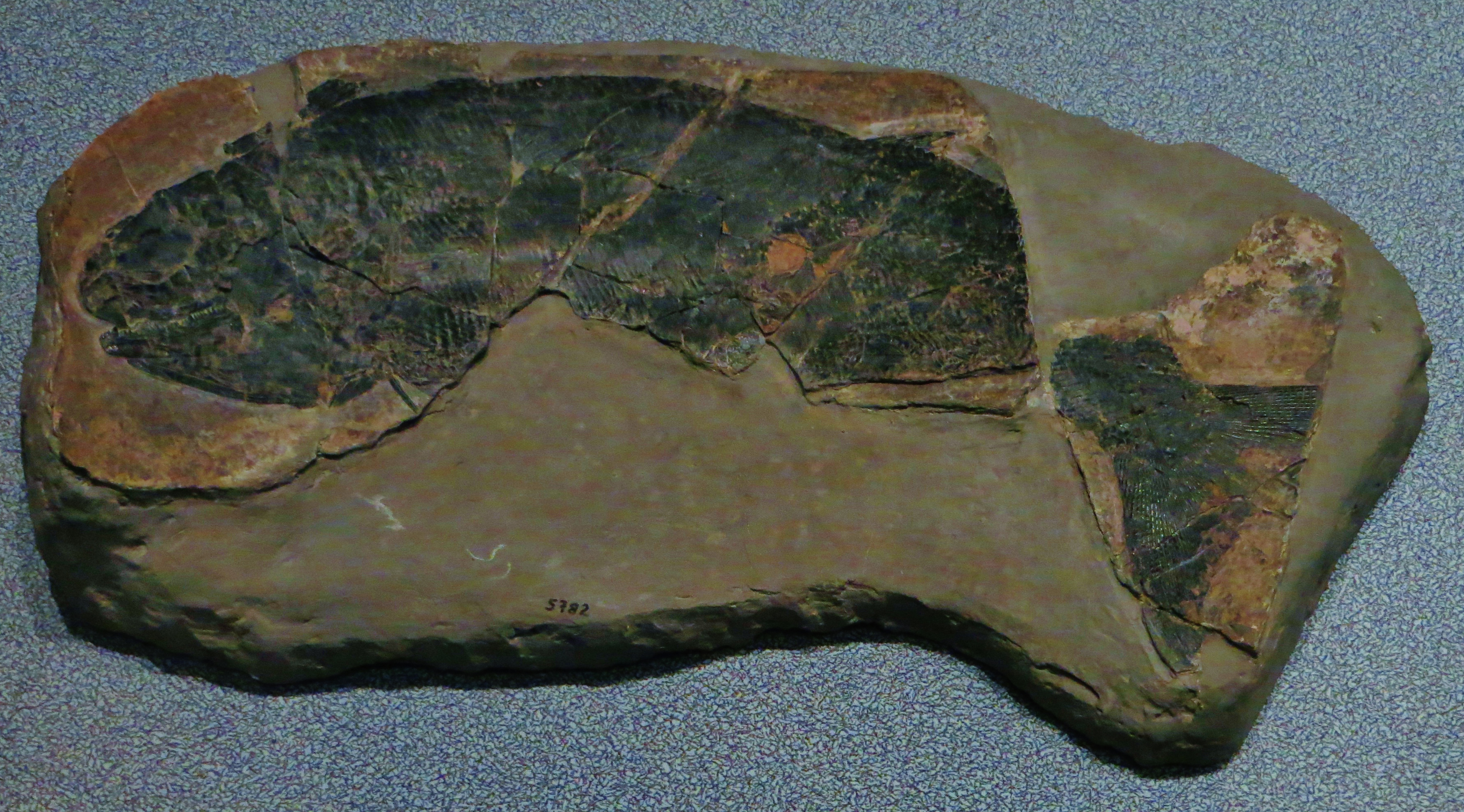 Fossil of Gabanellia, an extinct fish- Took the picture at Museo di Scienze Naturali, Bergamo